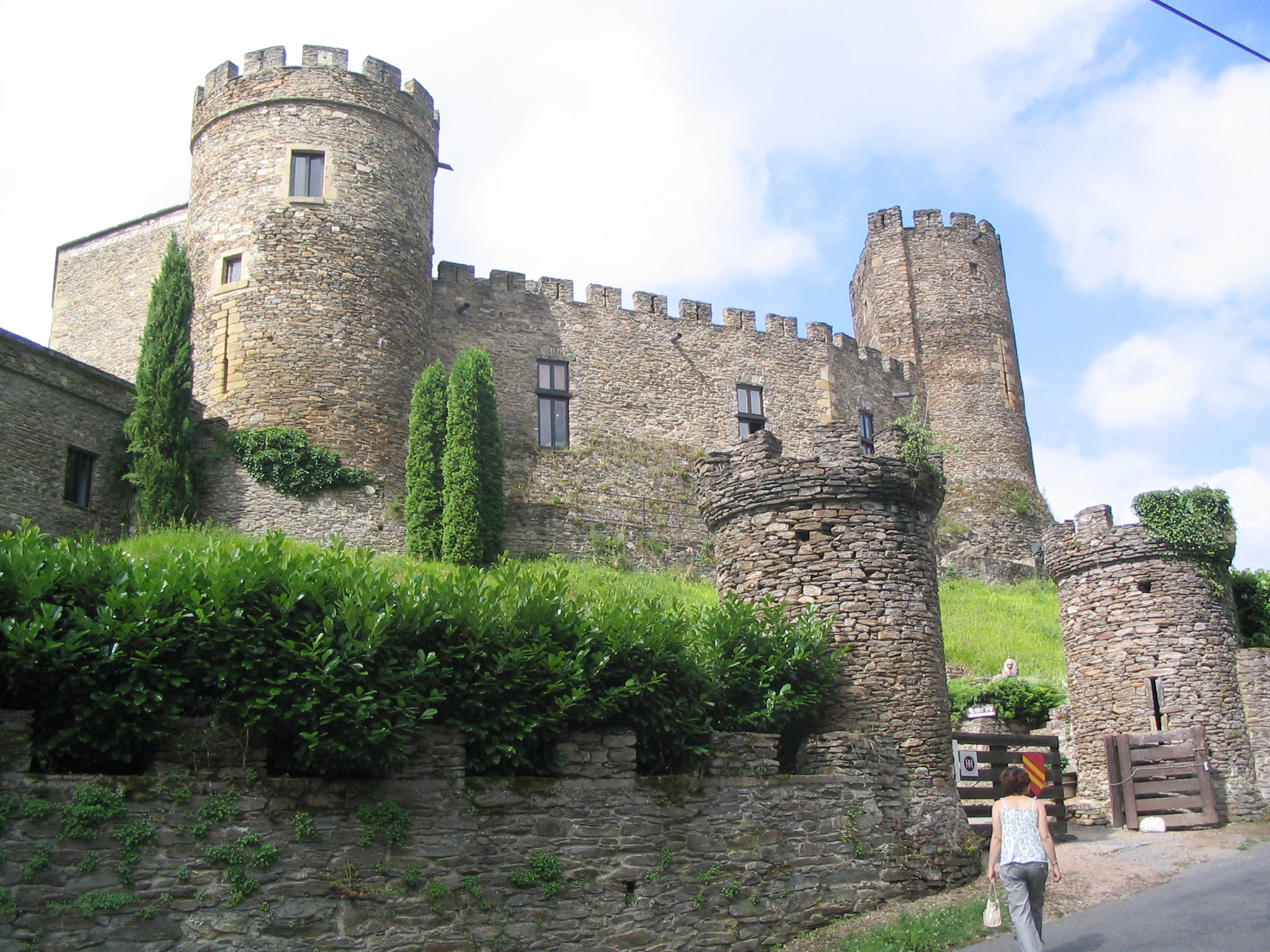 Château de Chouvigny, situé sur la commune de Chouvigny (Allier, 03).